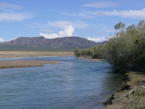 Тэсийн-Гол в районе города Цэцэрлэг